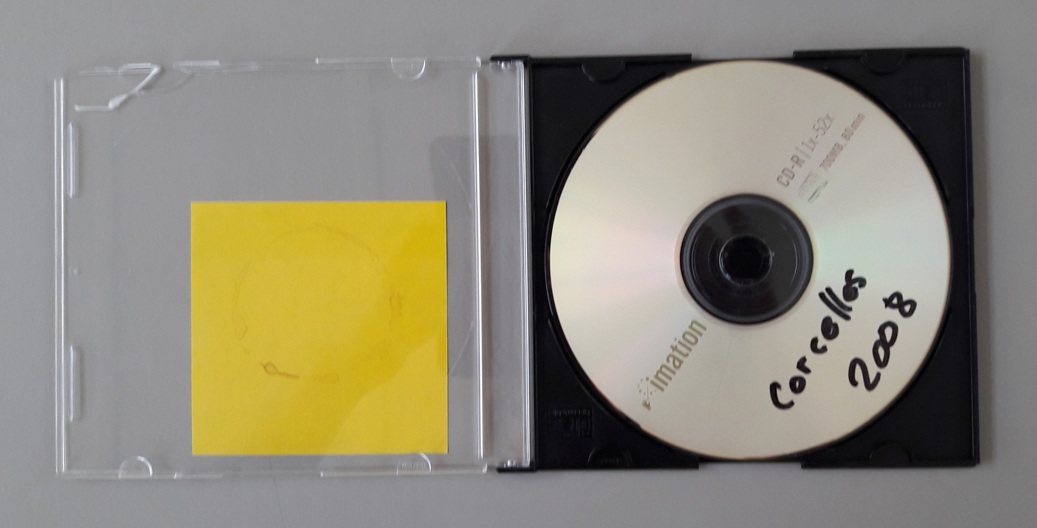 Photo de la pochette d'un disque CD-R